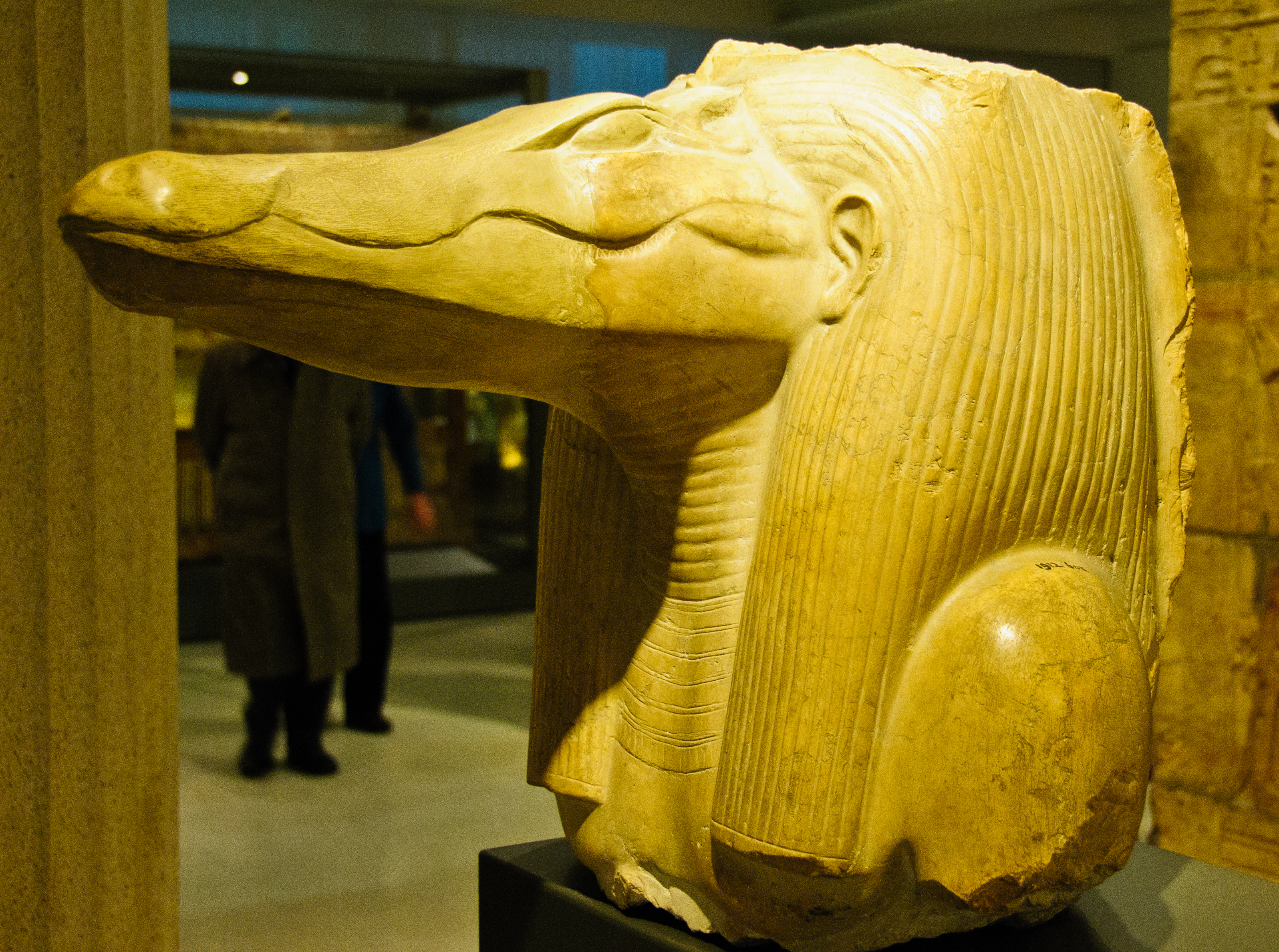 Oxford-31-2